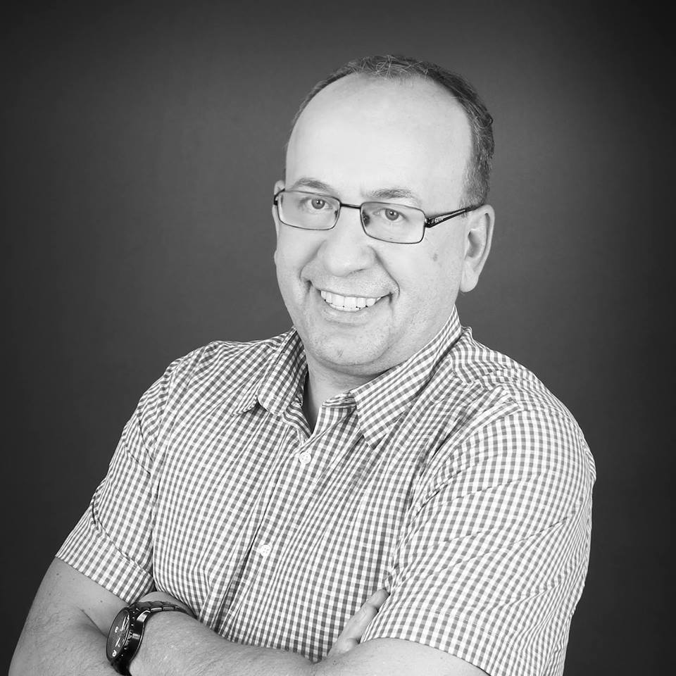 Foto Stefan Pachmayr